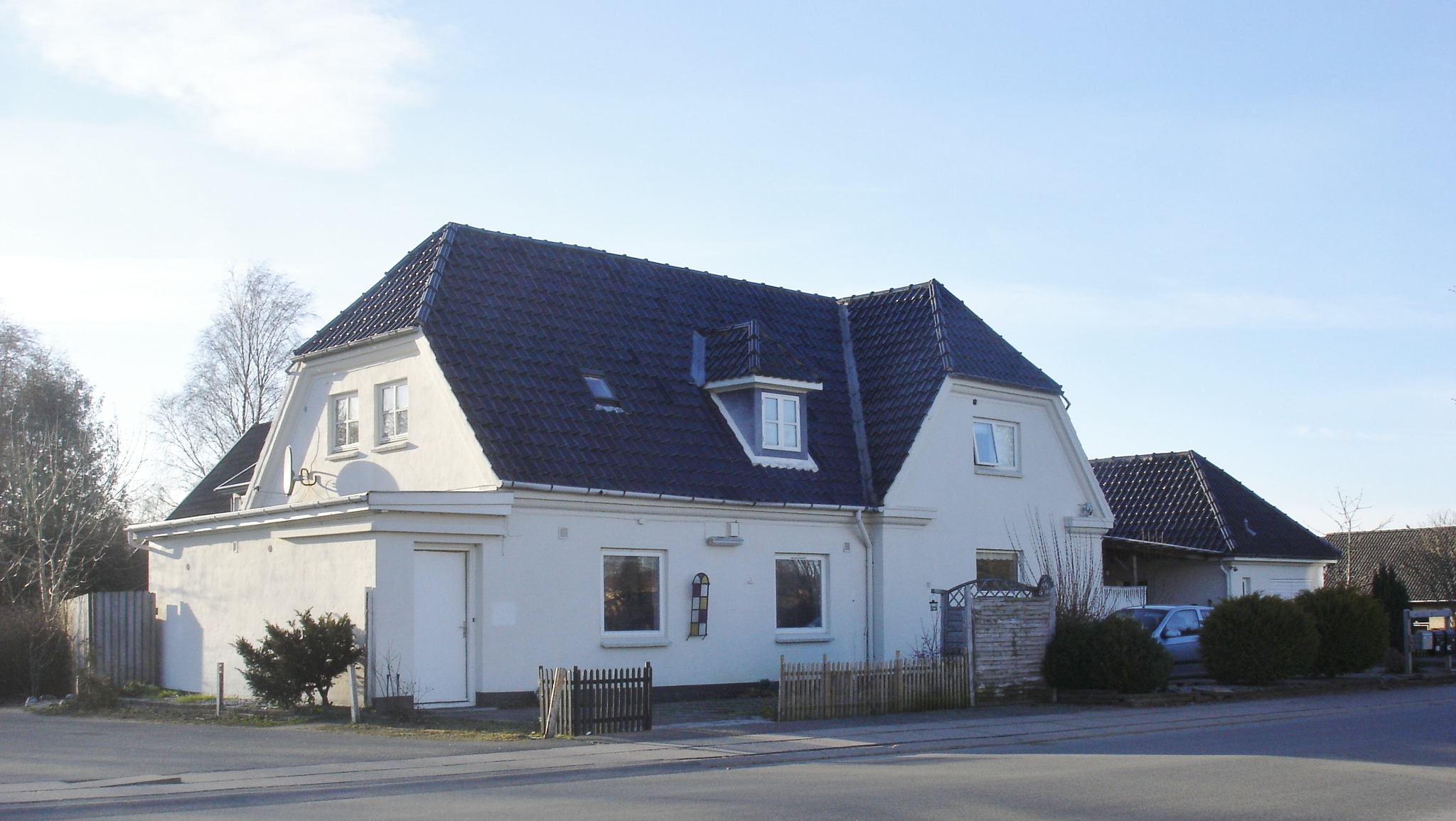 Morud Station